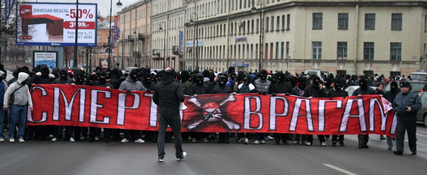 Проход болельщиков "Спартака" в Санкт-Петербурге перед матчем, закончившийся задержанием всех участников. 2009 год